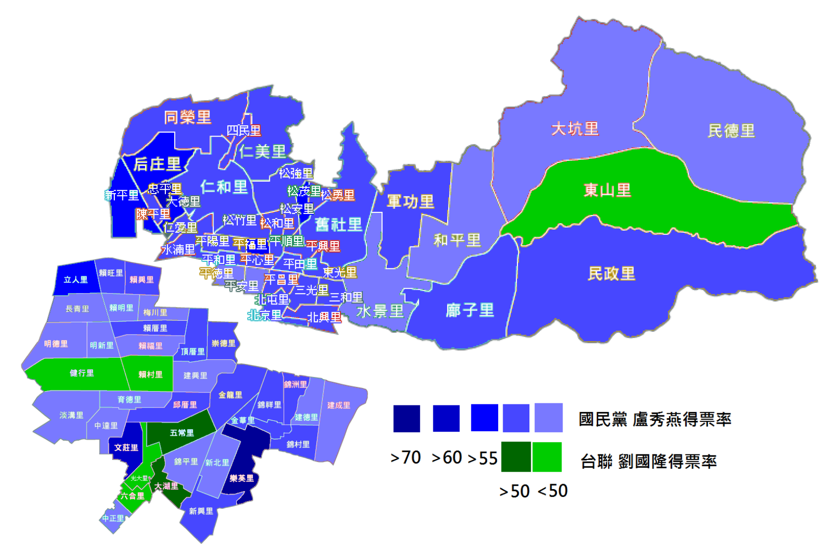 2016台中市北屯北區各里得票率